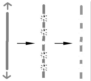 link My personal site Licensing تصنيف:هندسة وصفية